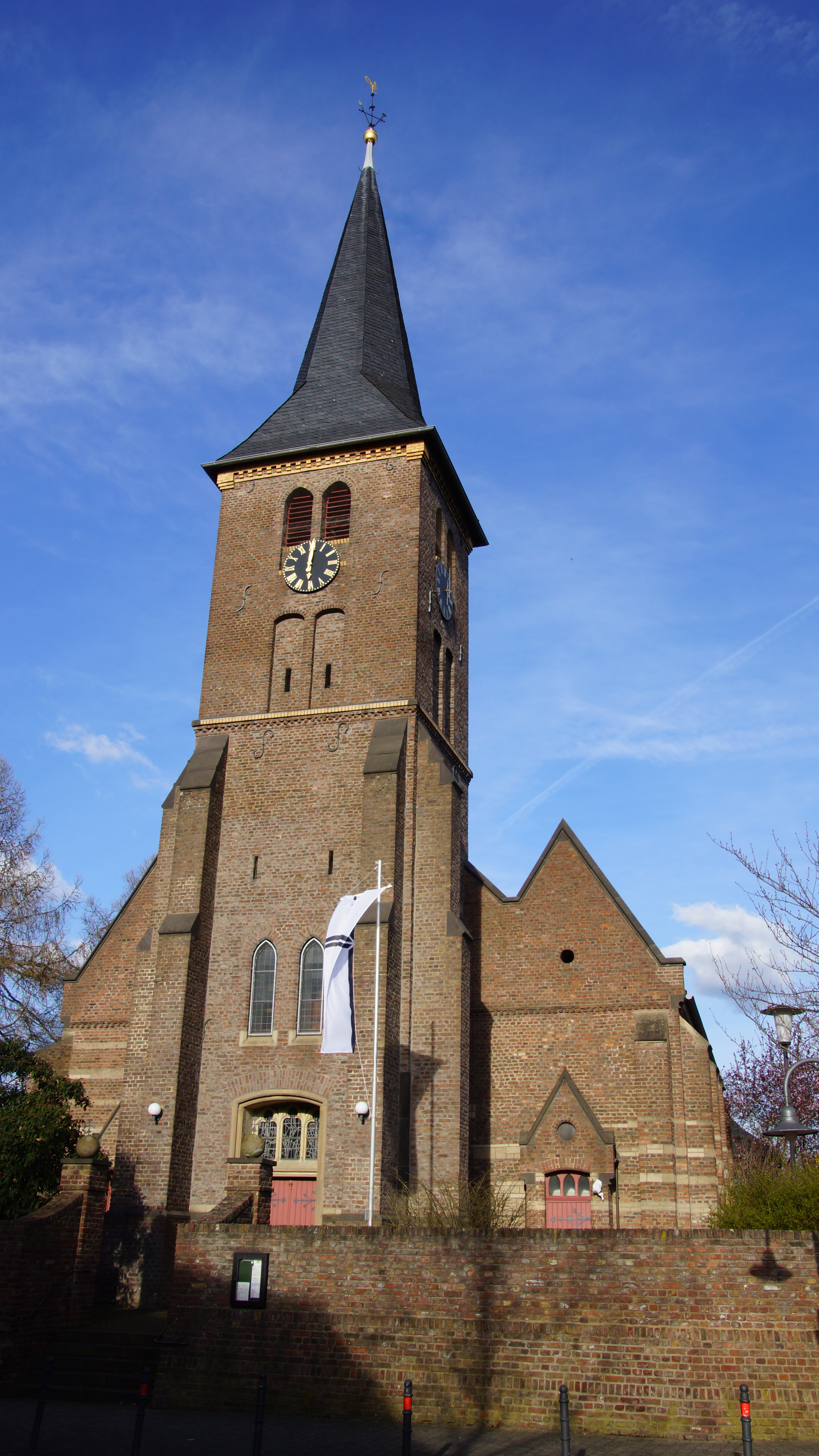 St. Johann Baptist in Bergheim-Niederaußem